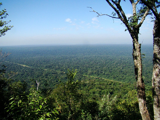 Vista do Parque Estadual do Morro do Diabo.